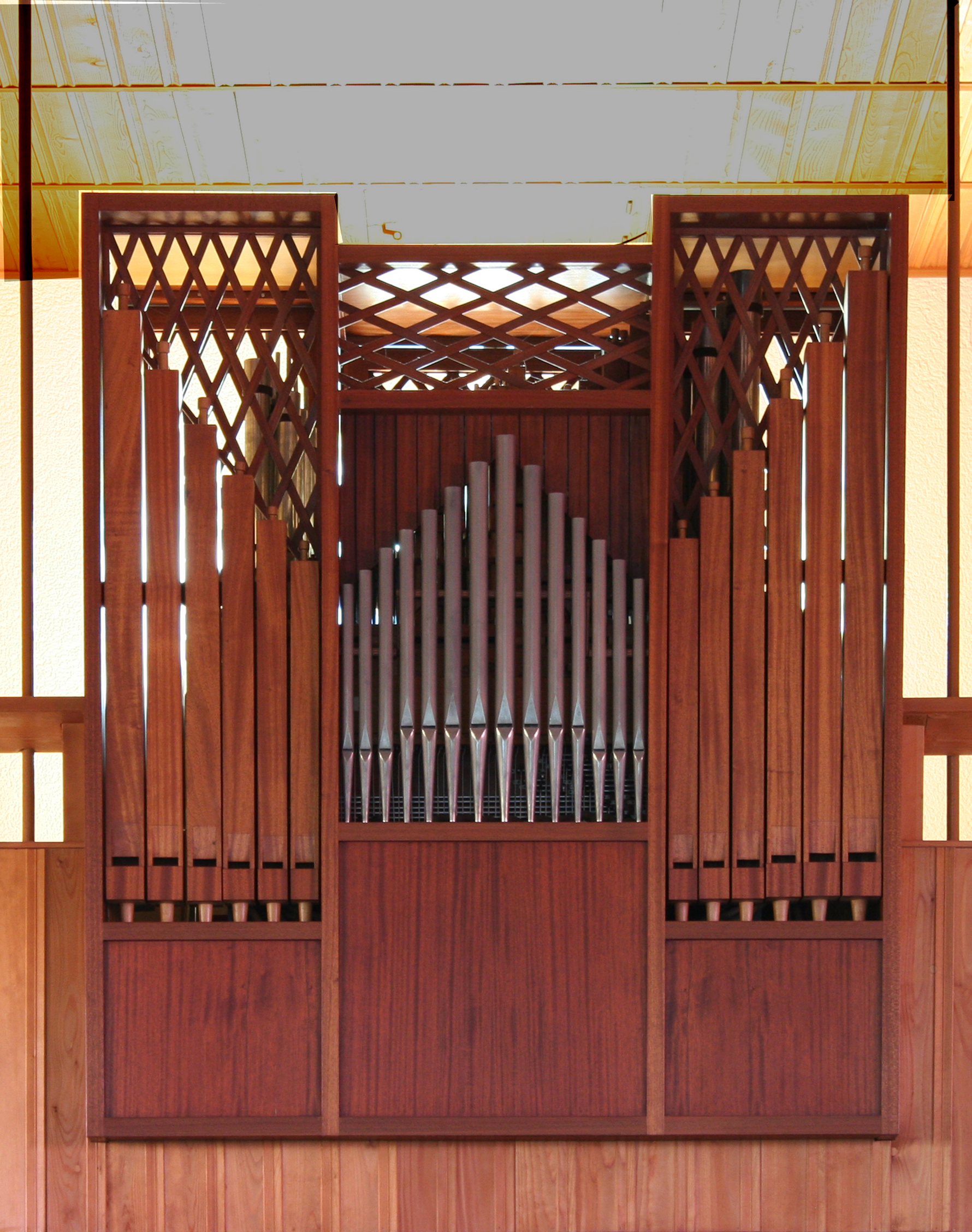 Römisch-katholische Kirche St. Josef Rickenbach-Sulz